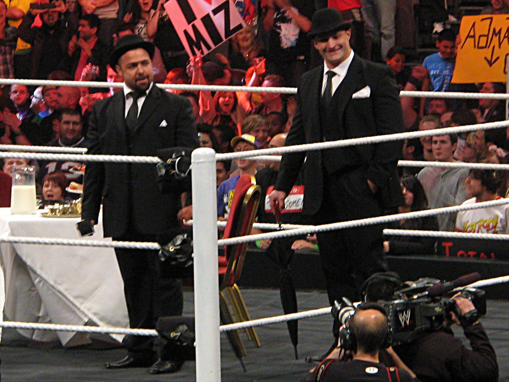 Santina Marella and Vladimir Kozlov